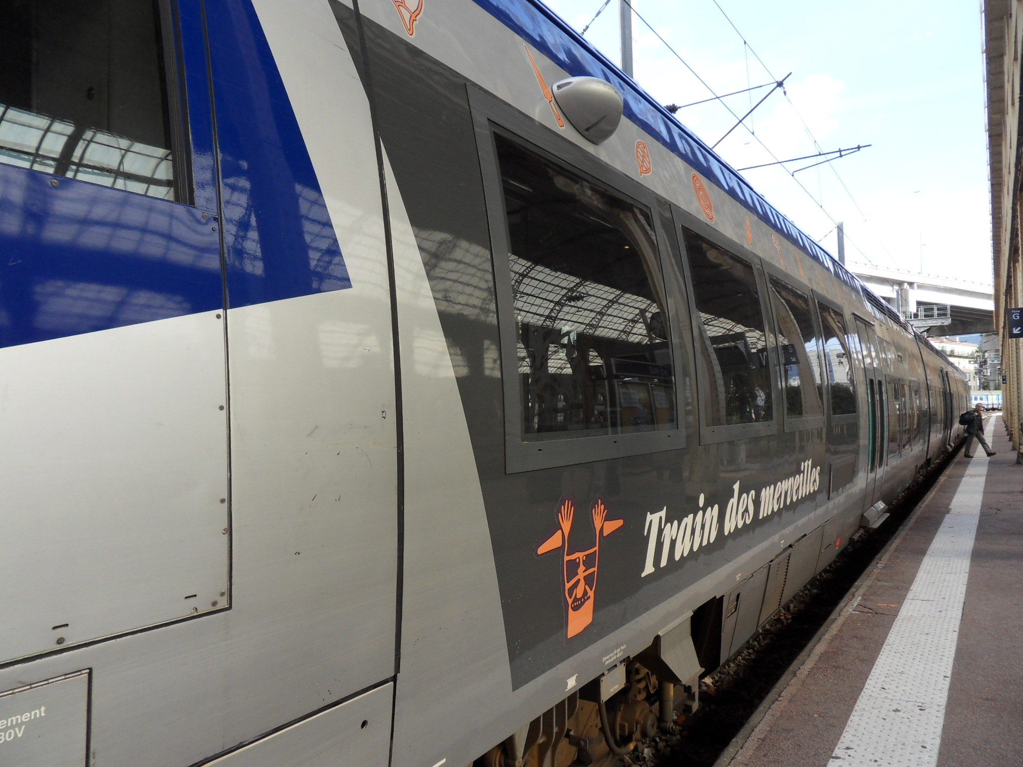 Gare de Nice Le train des merveilles prêt au départ vers Tende